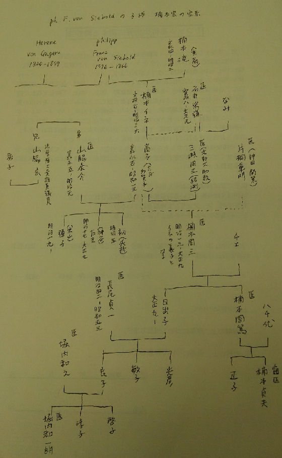 地元の郷土史研究家が記したフィリップ・フランツ・フォン・シーボルト家系図の写し（一部改変）